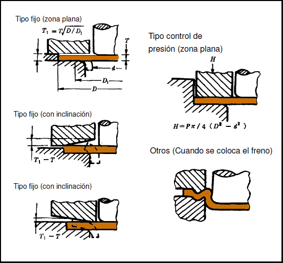 Embutición-pisadores